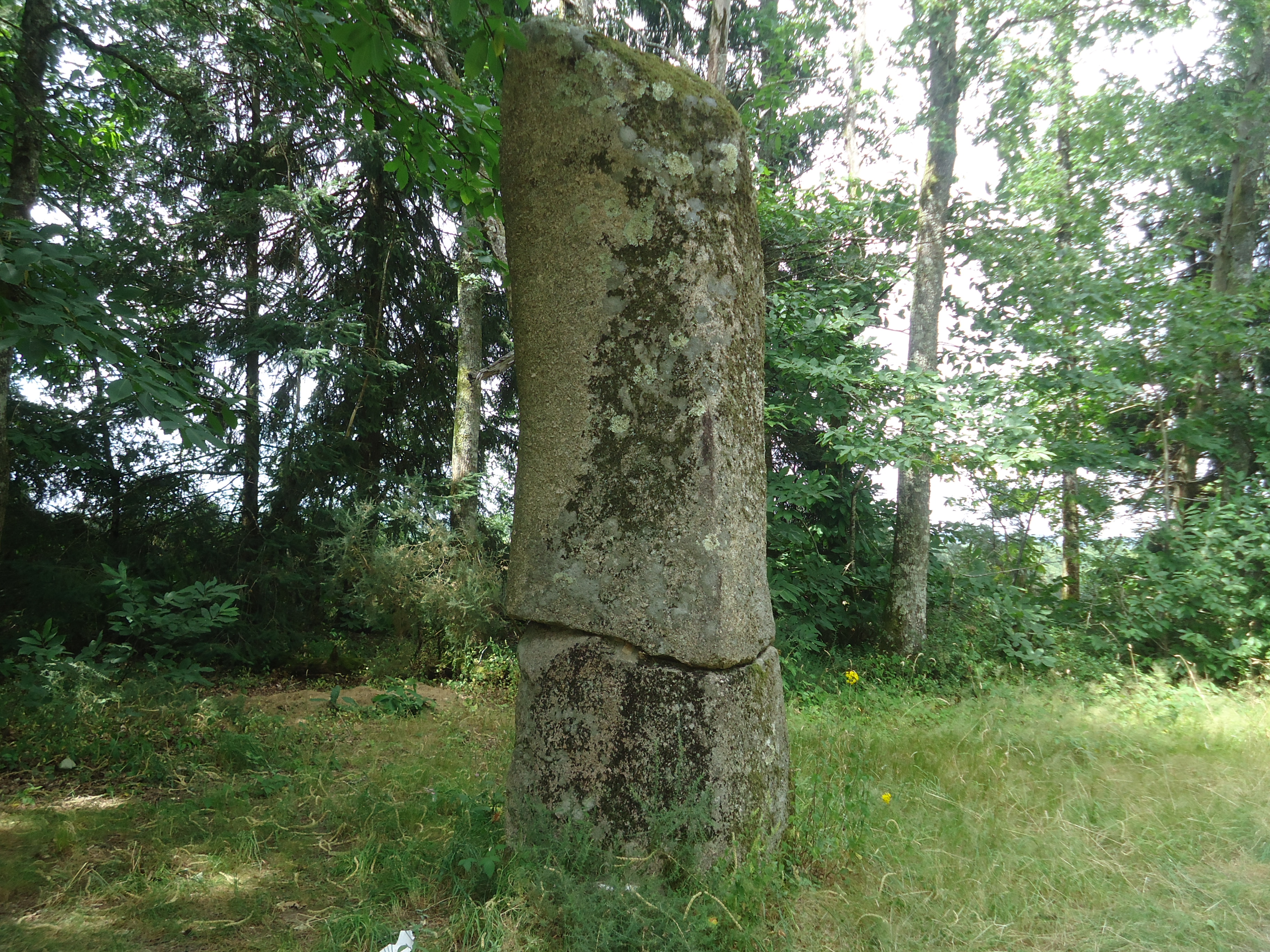 Menhir du Pic à Javerdat en Haute-Vienne